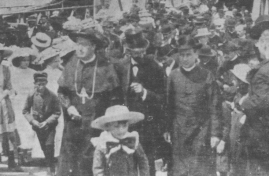 Julien-Édouard-Alfred Dubuc (au centre) faisant visiter la Pulperie de Chicoutimi à Mgr. Stagni (à gauche) en 1921